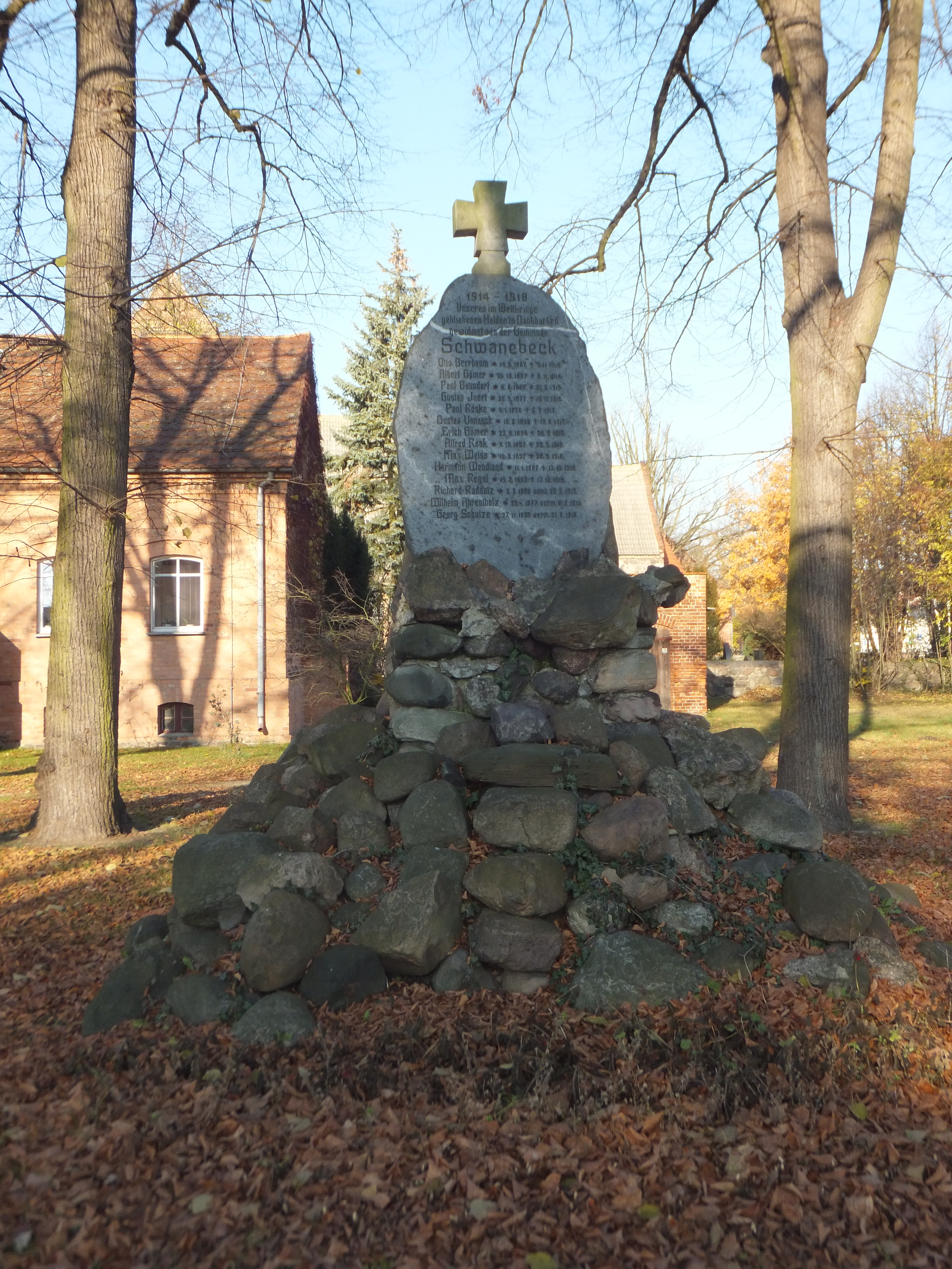 Schwanebeck, Denkmal für die im Ersten Weltkrieg Gefallenen